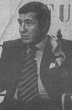 Il regista italiano Duccio Tessari Foto tratta da Stampasera, 4 luglio 1984